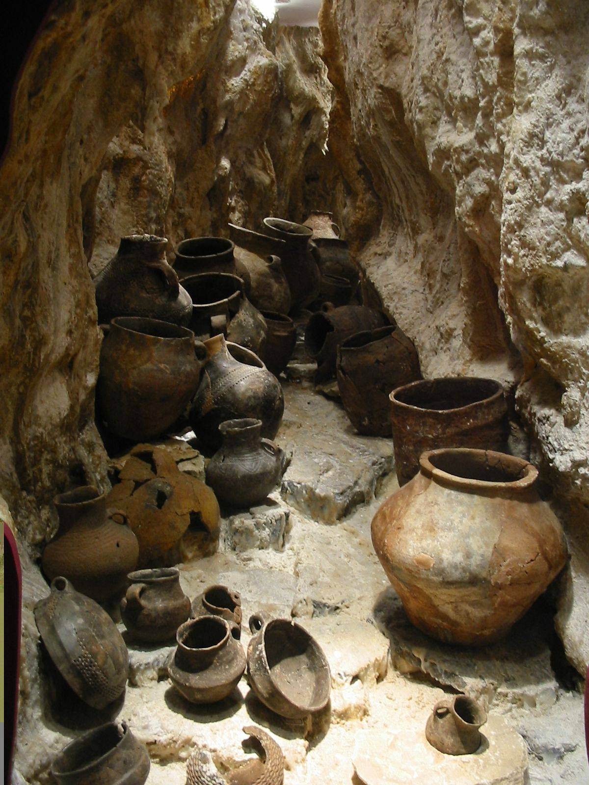 vaisselle de la grotte des Duffaits (Bronze moyen, -1550 -1300); musée municipal d'Angoulême, France